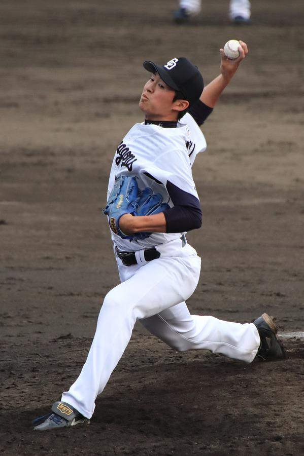 石垣幸大